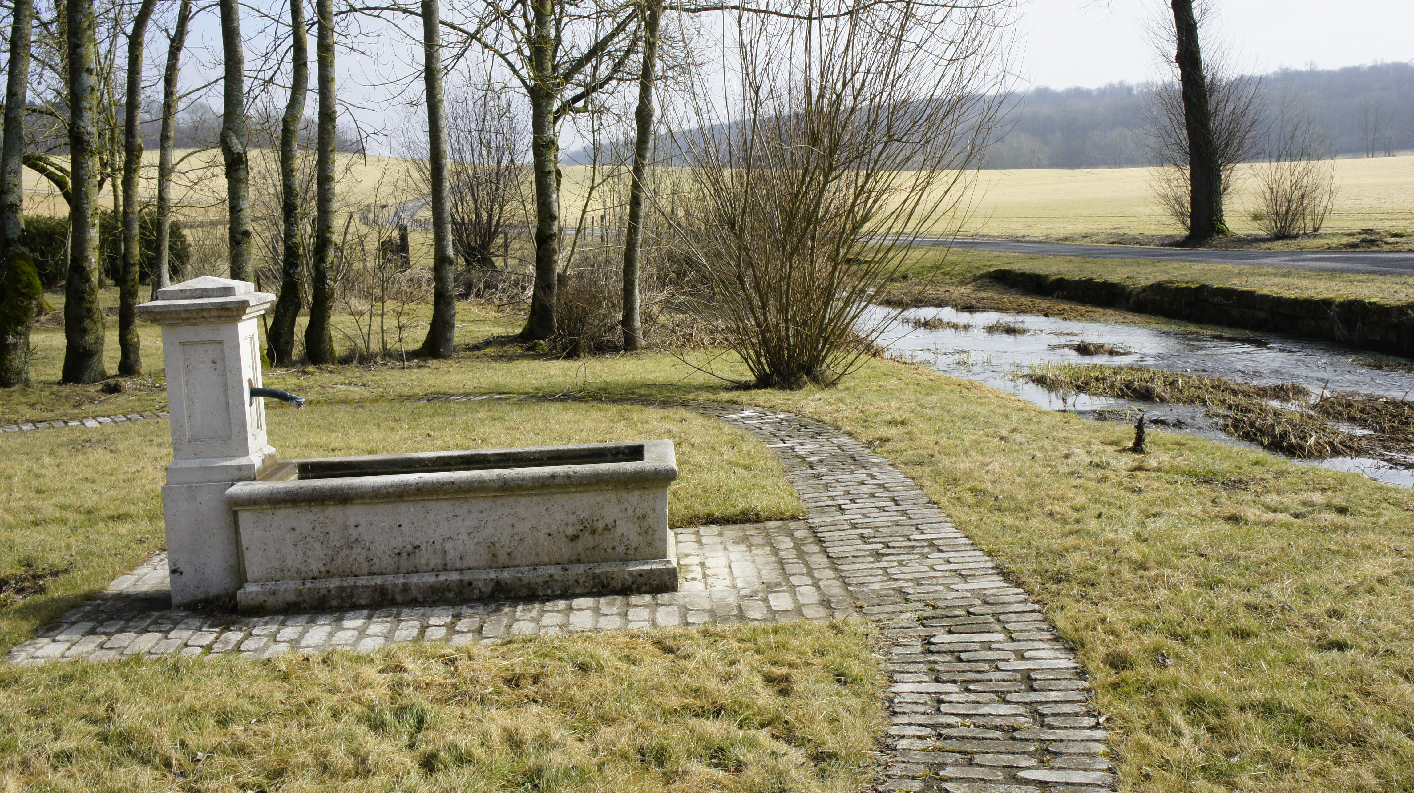 Lavoir_et_ruisseau affluent de l'Aire_à Amblaincourt_.